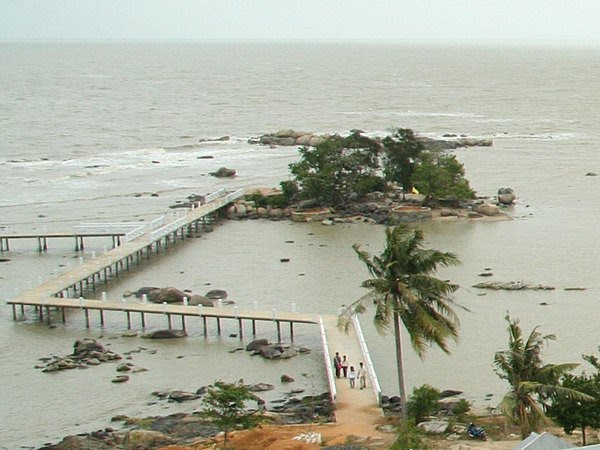 L'île de Simping dans la province de Kalimantan occidentale en Indonésie